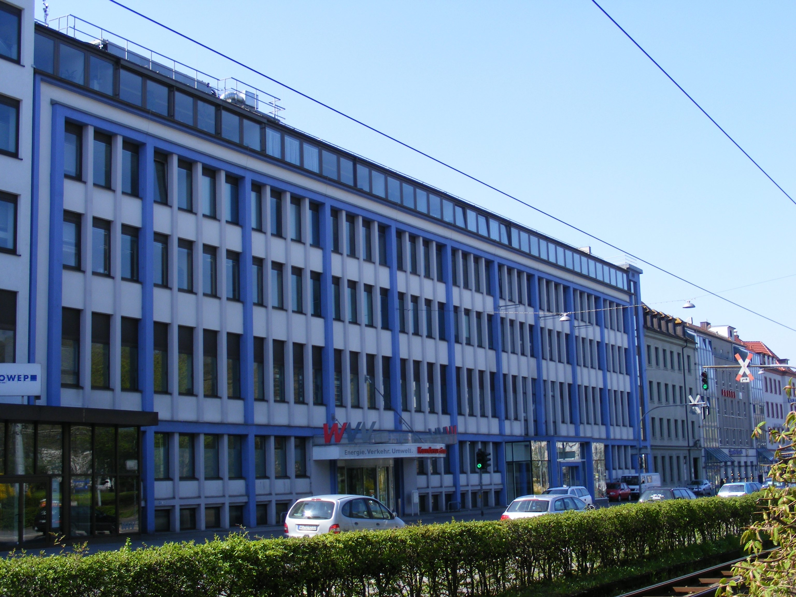 Würzburger Versorgungs- und Verkehrs-GmbH - Kundenzentrum, Haugerring 5, 97070 Würzburg.